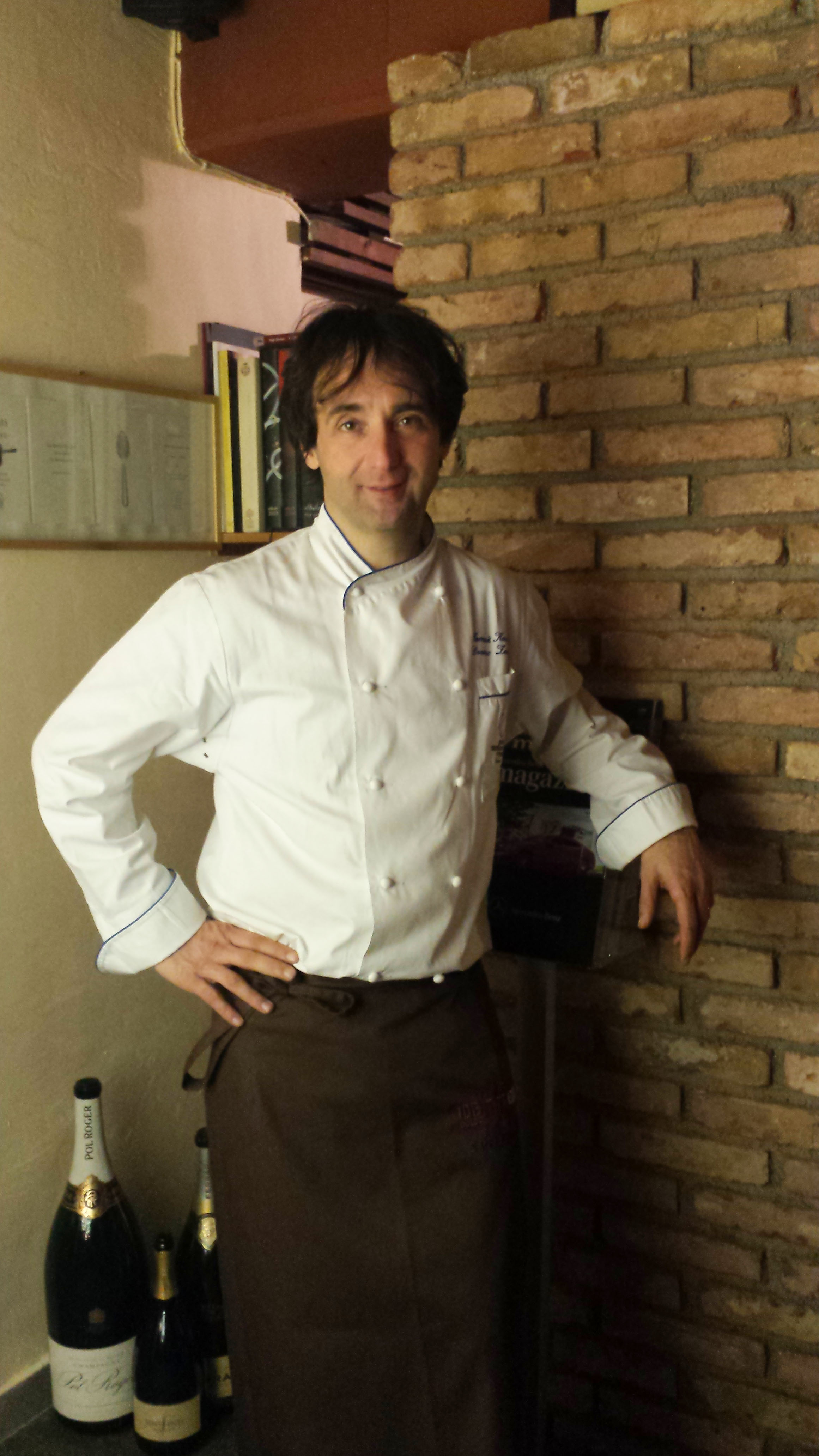 Tomaž Kavčič, Vrhunski slovenski kuhar, Gostilna pri Lojzetu, Dvorec Zemono, Vipava, februar 2016. Avtor: M. Mravlja